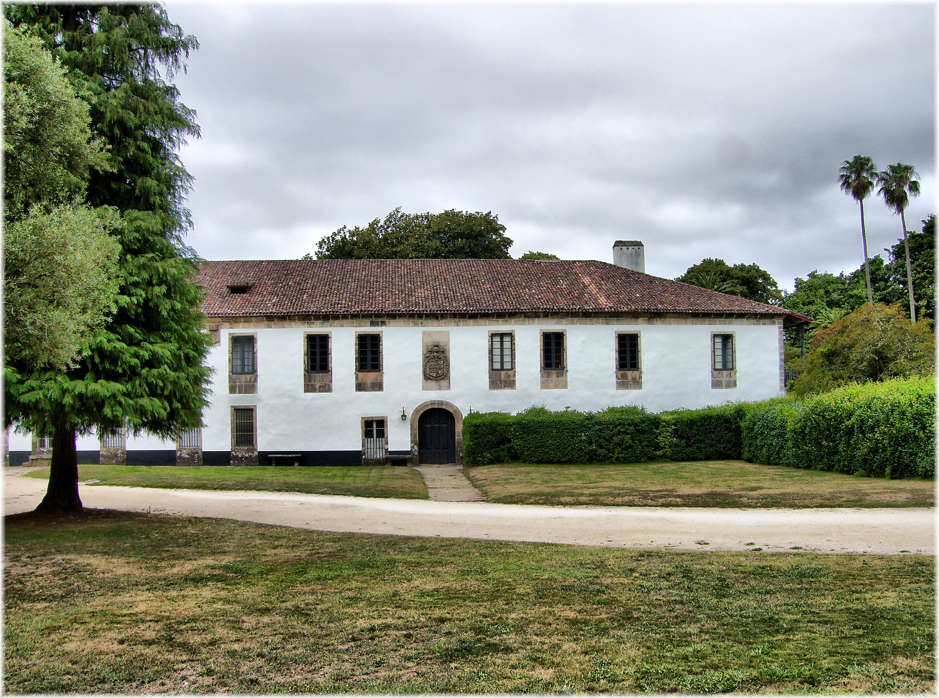 La colección de camelias, cuyo origen se sitúa a comienzos del siglo XIX, se puede considerar como la mejor de Galicia, ya que cuenta con al menos quinientas variedades distintas. Es impresionante verlas en plena floración , especialmente en la Carrera de las Novias o la Carrera Grande, paseos que cuentan hasta con 72 grandes ejemplares. Otros elementos a destacar son el paseo de olivos centenarios, probablemente del siglo XVI y único en el norte de España, la cascada y la carrera de bojes, espectacular túnel flanqueado por enormes arbustos de esta especie. (Declarado Bien de Interés Cultural). Este pazo presenta una fachada alargada con dos puertas sobre las que aparece dos escudos con los emblemas y la cruz de Santiago. Destacan por su arquitectura e iconografía la barroca fonte da Coca y el hórreo, ambos del siglo XVII. Los jardínes de este pazo están considerados como uno de los principales espacios botánicos de Galicia, Merece la pena visitar la Carreira das Oliveiras, el Estanque Redondo, la cascada, la Fuente de Jovellanos, la Fuente de la Señora...